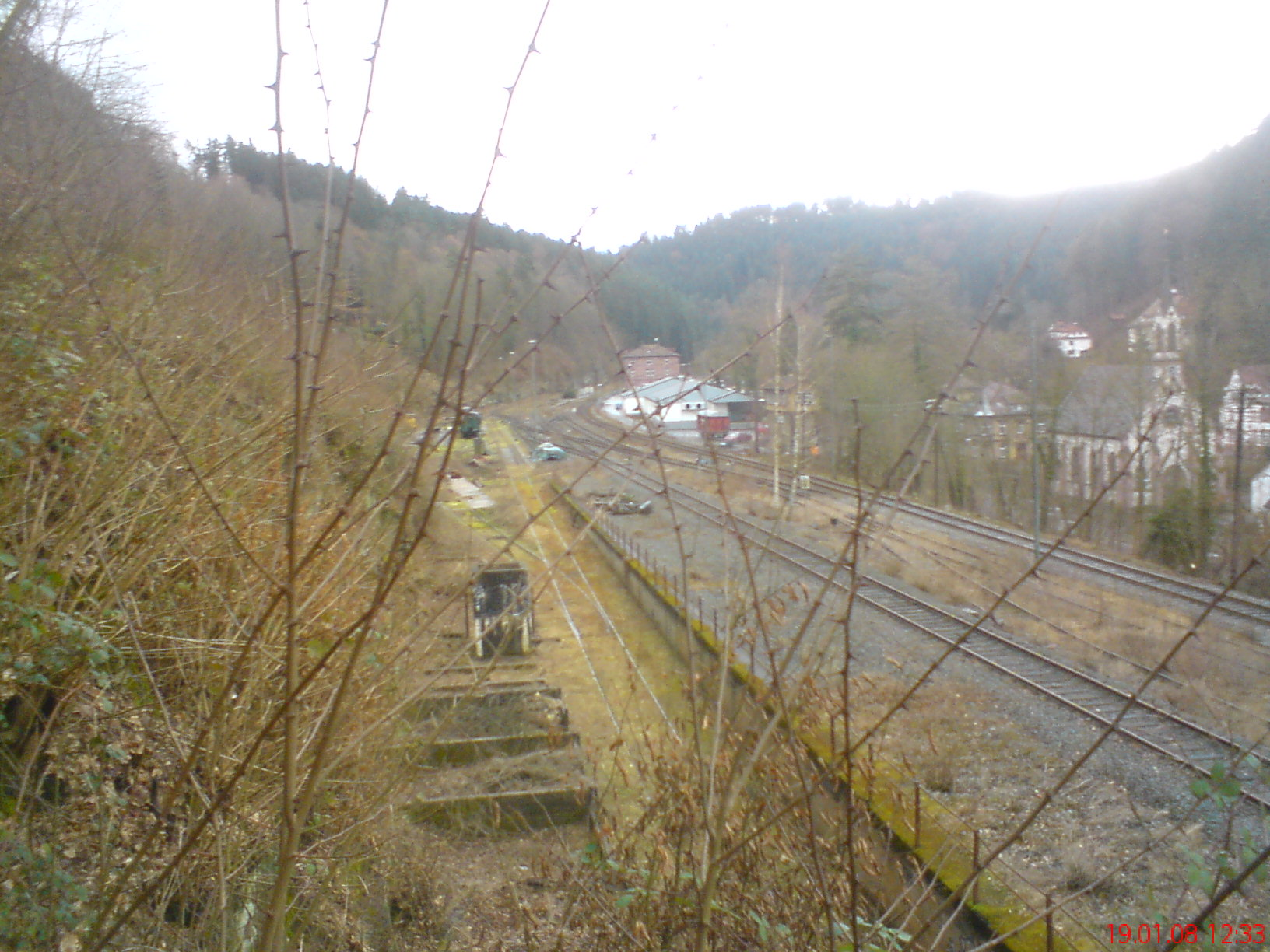 Ganz rechts das Gleis der Nagoldtalbahn; das nach unten rechts führende Gleis ist das der der würrtembergischen Schwarzwaldbahn; davon links das gesamte Bw Calw mit Fundamenten und Bekohlung; über Bildmitte der alte Bahnhof